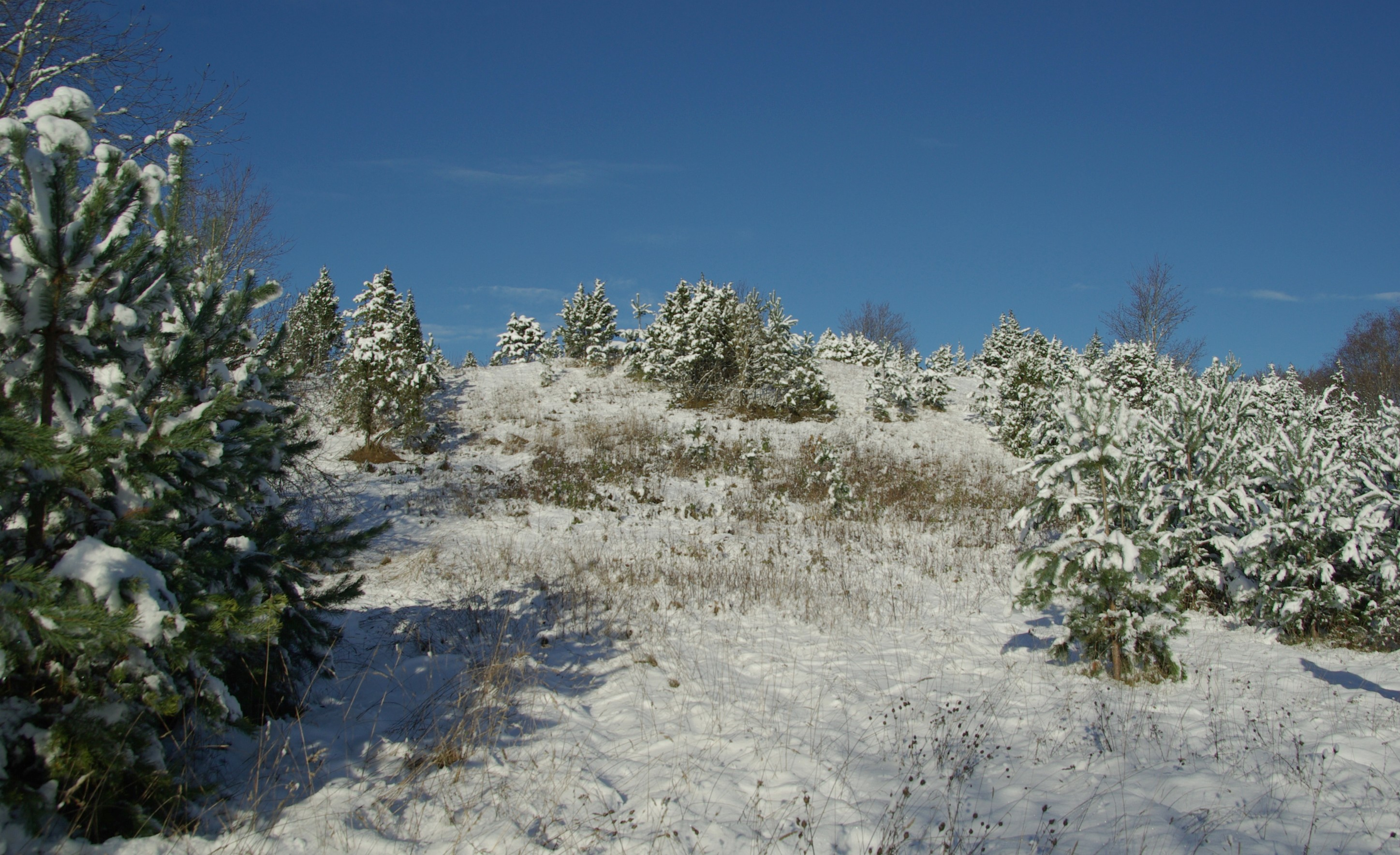 Kloodi Pahnimägi on linnamägi Rakverest umbes 6,5 km loode pool, ulatusliku Pahnimäe oosi lõunapoolses osas.